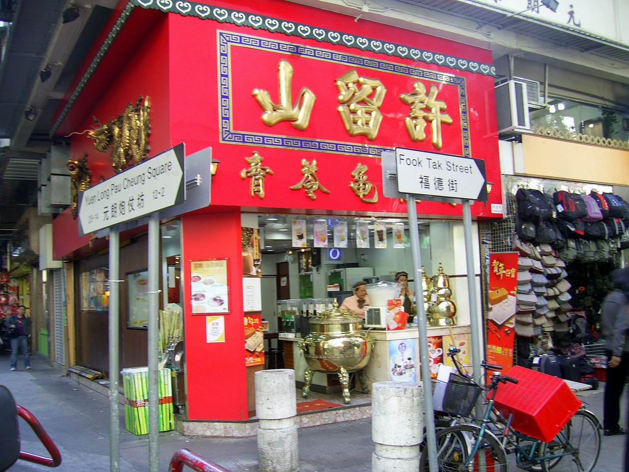 中文（香港）: 許留山元朗老舖